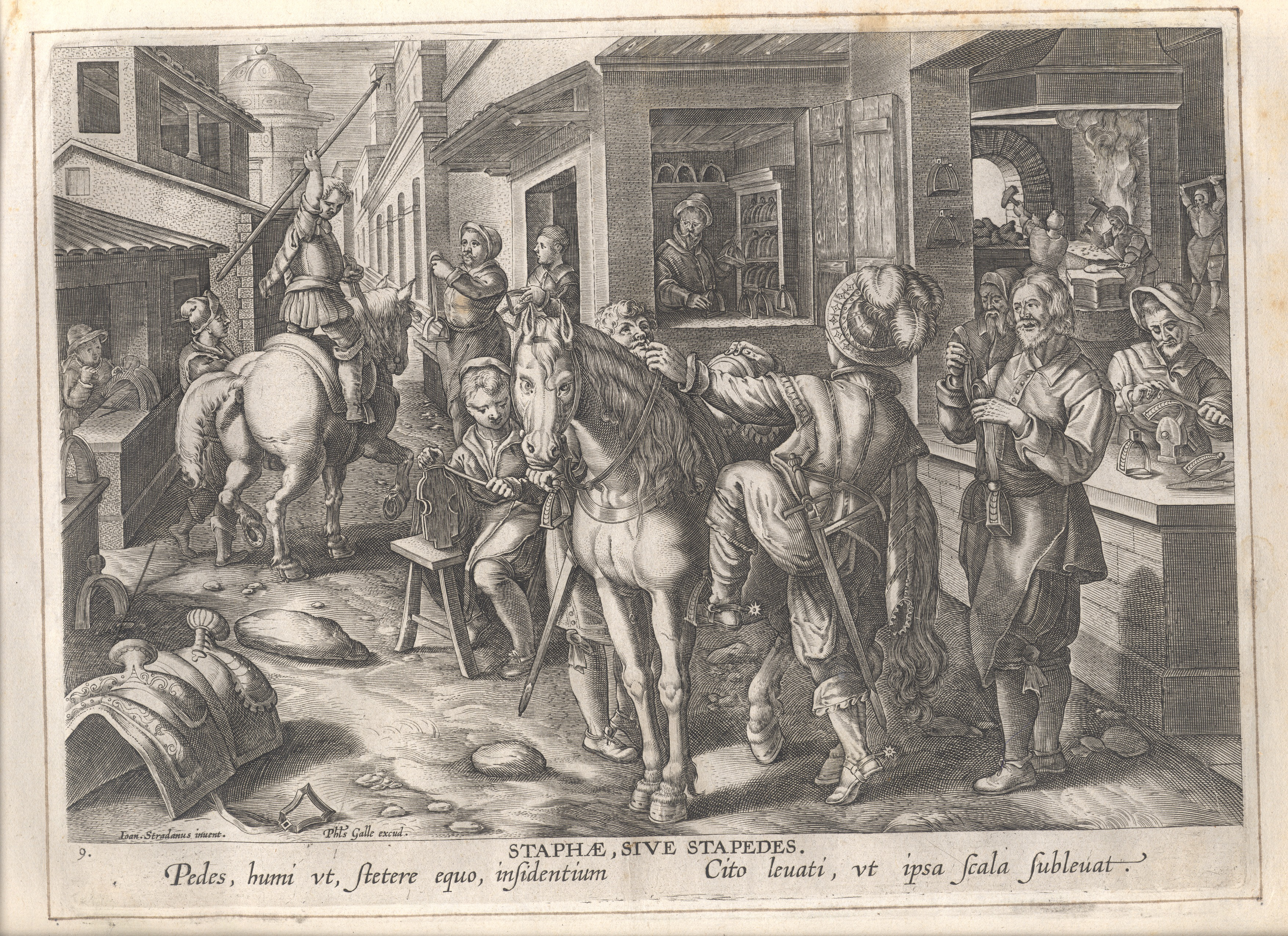 anonymous: The invention of stirrups Artist anonymousDesigner Stradanus (1523–1605) Alternative names Jan van der Straet, Giovanni della Strada, Johannes della Strada, Giovanni Stradano, Johannes Stradano, Giovanni Stradanus, Johannes Stradanus, Jan van Straeten, Jan van StratenDescriptionFlemish painter and draughtsmanDate of birth/death 1523 2 November 1605 Location of birth/death Bruges FlorenceWork location Antwerp (1545), Florence (circa 1550-1605), Rome (circa 1550-1553), Montemurlo (1590)Authority control : Q143595 VIAF: 29699451 ISNI: 0000 0000 8108 906X ULAN: 500011304 LCCN: n84804240 NLA: 35875335 WorldCat creator QS:P170,Q143595 Title De uitvinding van de stijgbeugelsPublisher Philip Galle Object type engraving Description Gravure , anoniem, Museum Plantin-MoretusMedium gravureCollection Museum Plantin-Moretus Native nameMuseum Plantin-MoretusLocationAntwerpCoordinates51° 13′ 05.86″ N, 4° 23′ 53.39″ E Established1877 Web page control : Q595802 VIAF: 130668175 ISNI: 0000 0001 2285 9666 LCCN: n50051109 UNESCO: 1185 GND: 1007736-4 WorldCat institution QS:P195,Q595802Accession number PK OPB 0186 010References described at URL: Source/Photographer Museum Plantin-Moretus Native nameMuseum Plantin-MoretusLocationAntwerpCoordinates51° 13′ 05.86″ N, 4° 23′ 53.39″ E Established1877 Web page control : Q595802 VIAF: 130668175 ISNI: 0000 0001 2285 9666 LCCN: n50051109 UNESCO: 1185 GND: 1007736-4 WorldCat institution QS:P195,Q595802Permission(Reusing this file) This file is made available under the Creative Commons CC0 1.0 Universal Public Domain Dedication. The person who associated a work with this deed has dedicated the work to the public domain by waiving all of their rights to the work worldwide under copyright law, including all related and neighboring rights, to the extent allowed by law. You can copy, modify, distribute and perform the work, even for commercial purposes, all without asking permission. Gravure , anoniem, Museum Plantin-Moretus